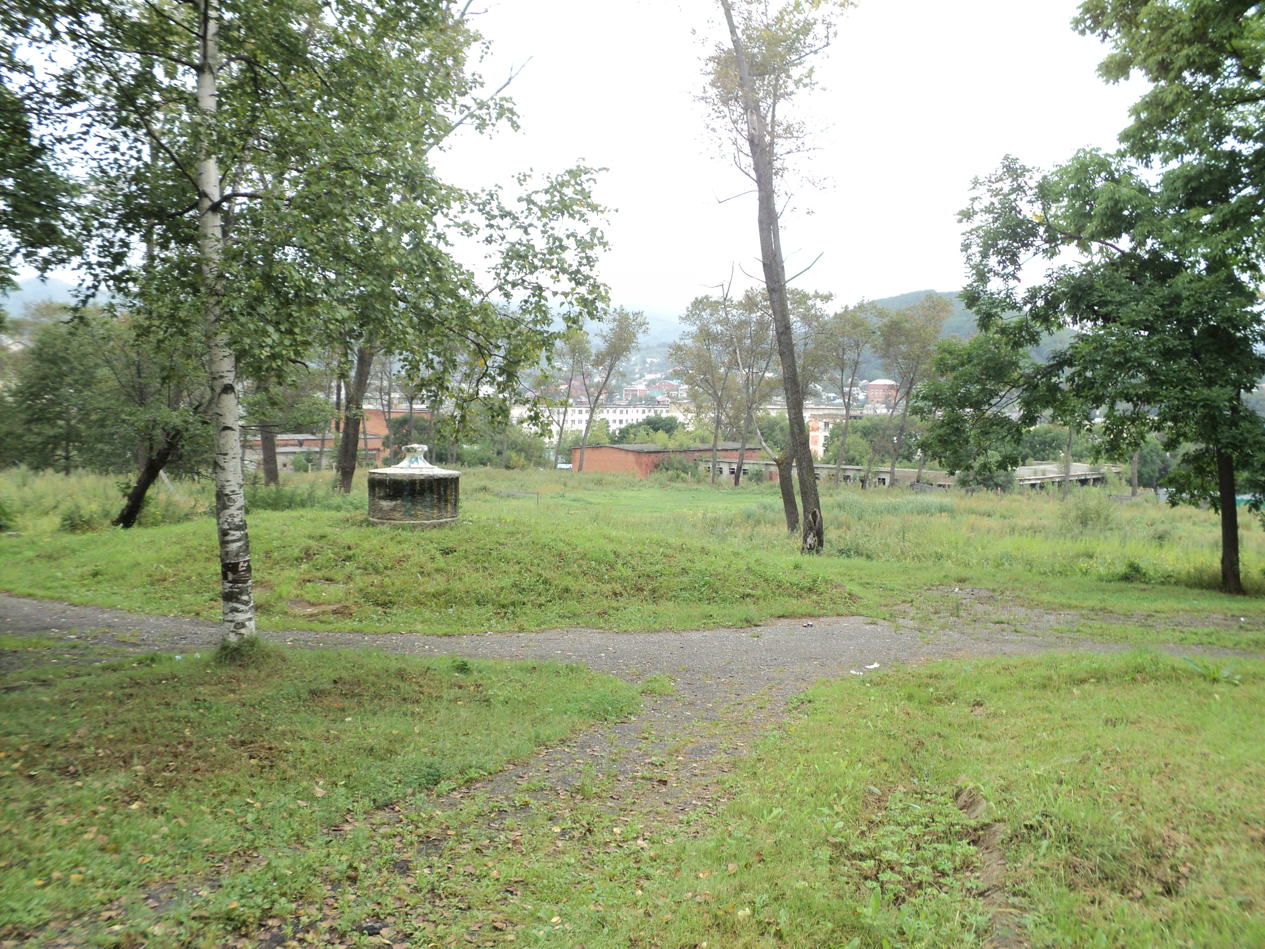 Парковая зона у Дома молодёжи